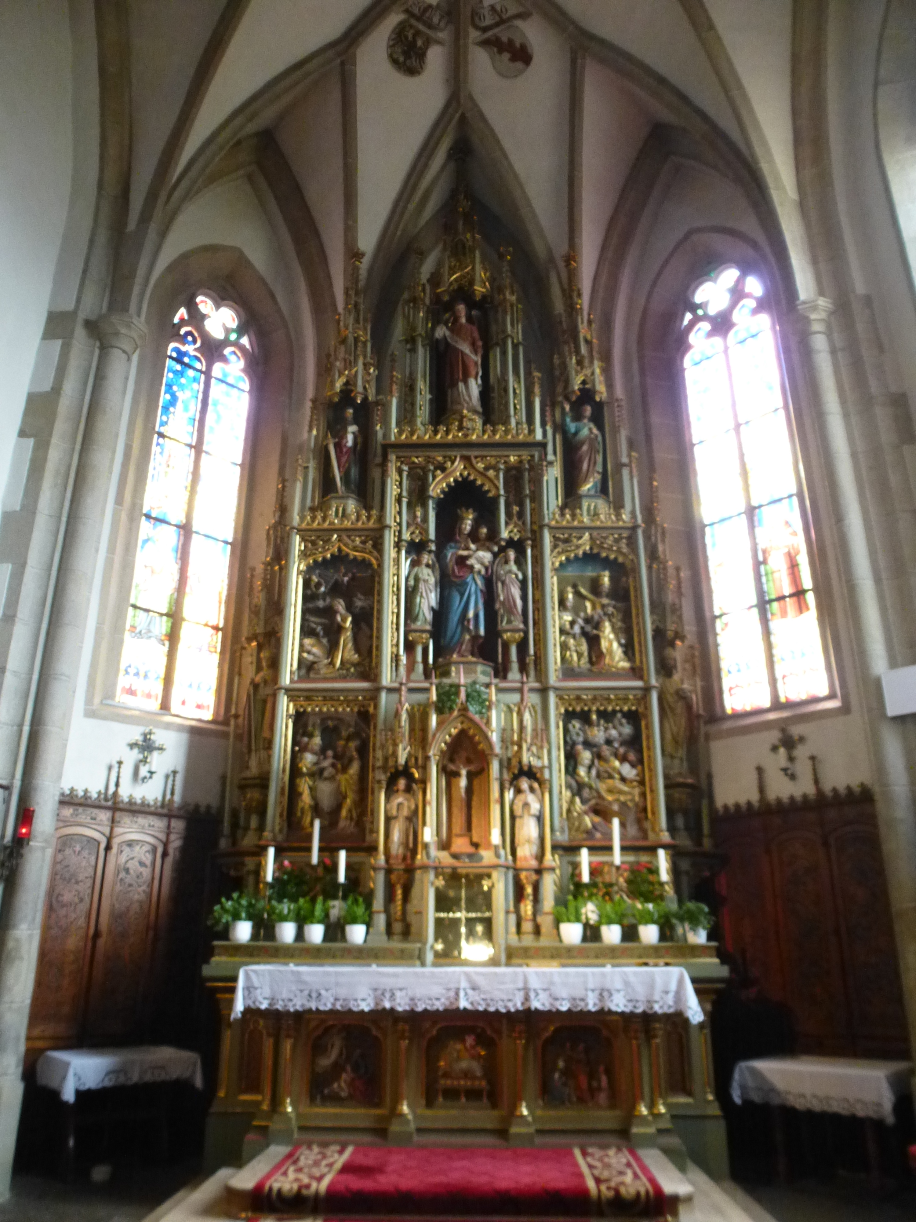 Hochaltar der Pfarrkirche St. Ulrich und Wolfgang in Deutschnofen